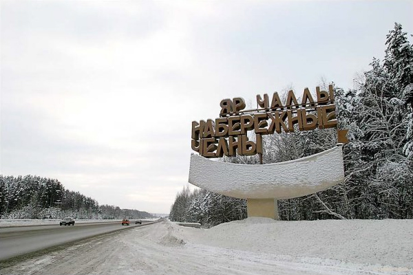 Въезд в город Набережные Челны дорога М7 со стороны г.Казань